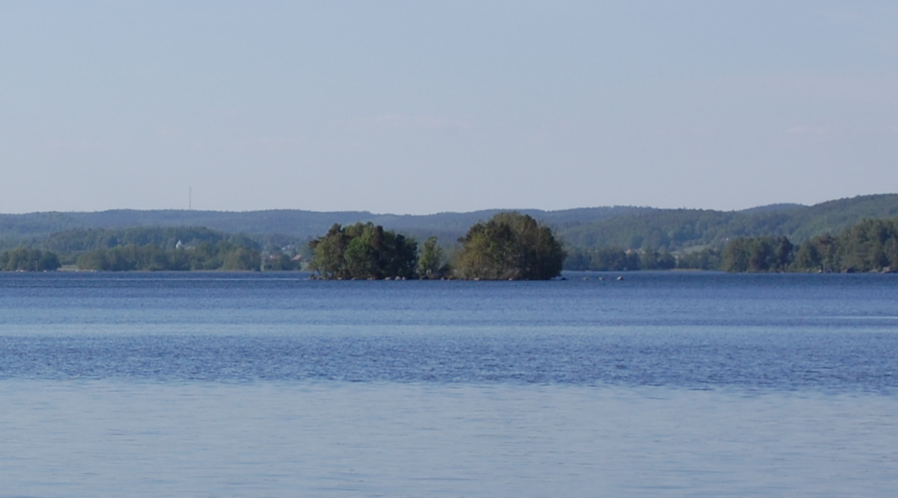 Insel Mageskäret im Ivösjön